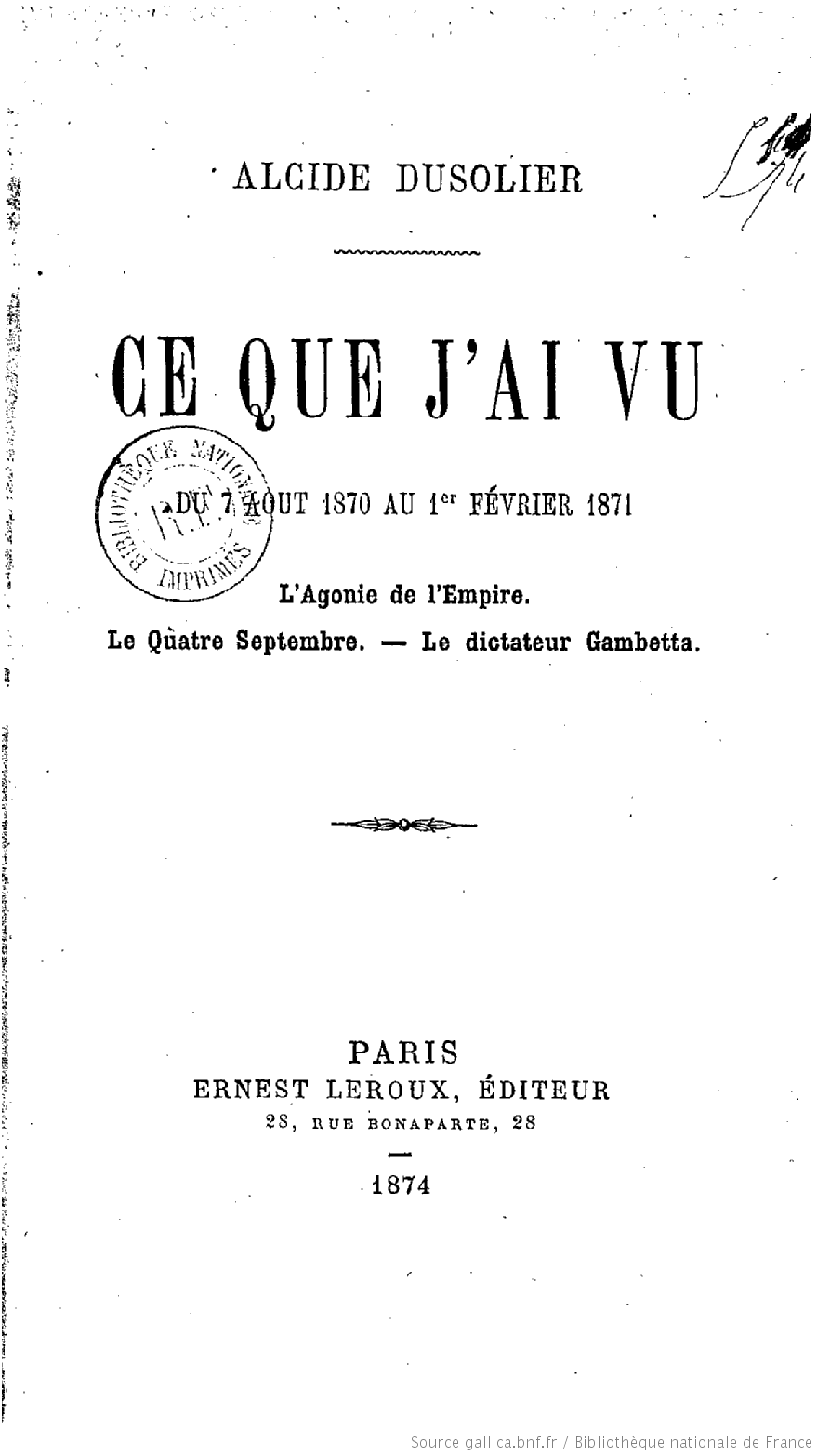 Ce que j'ai vu du 7 août 1870 au 1er février 1871 : l'agonie de l'empire, le 4 septembre, le dictateur Gambetta par Alcide Dusolier, publié à Paris chez Ernest Leroux.